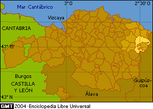 Localización de Marquina en Vizcaya, EspañaMapa base generado con la aplicación Online Map Creation, Martin Weinelt (GMT) y límites municipales de Diputación Foral de Bizkaia (Cartografía y planes urbanísticos)